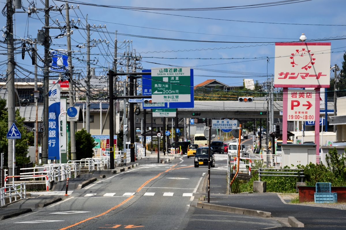 国道178号・鳥取県道155号網代港岩美停車場線沿いにロードサイド店が並ぶ。